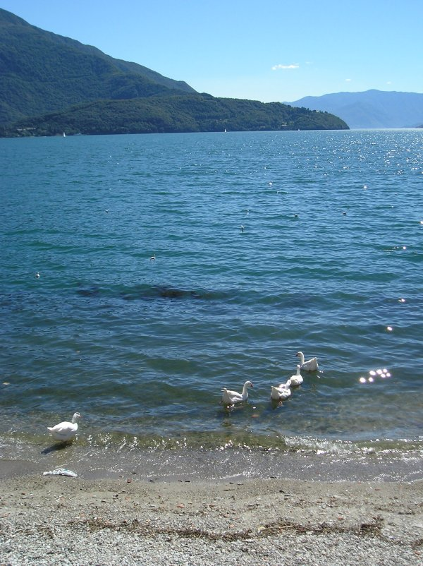 À propos de l'image Summary Lac de Côme, vu depuis le nord Date Août 2004 Photographe amateur Photographie prise par François Trazzi